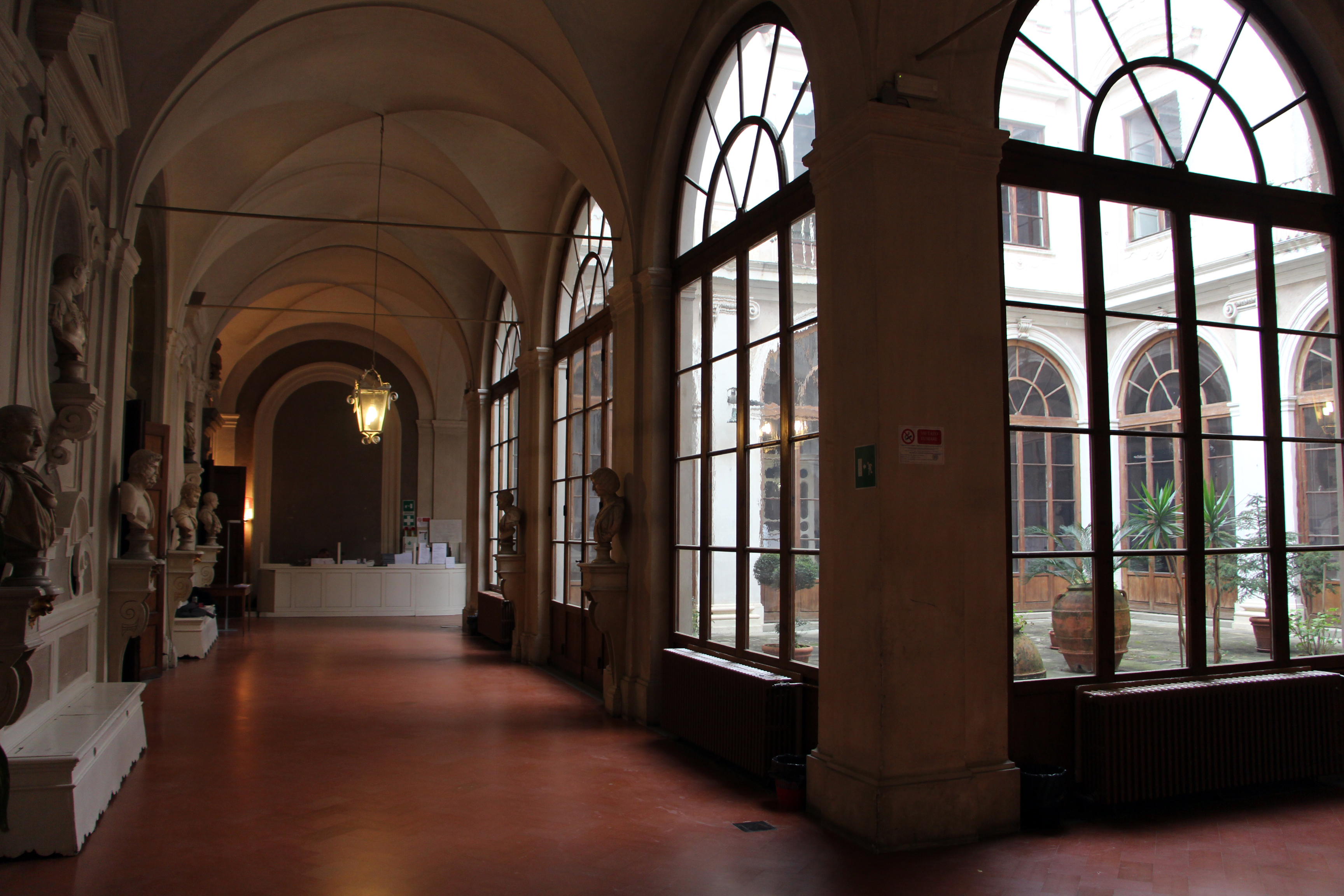 Villa di Poggio Imperiale - Cortile